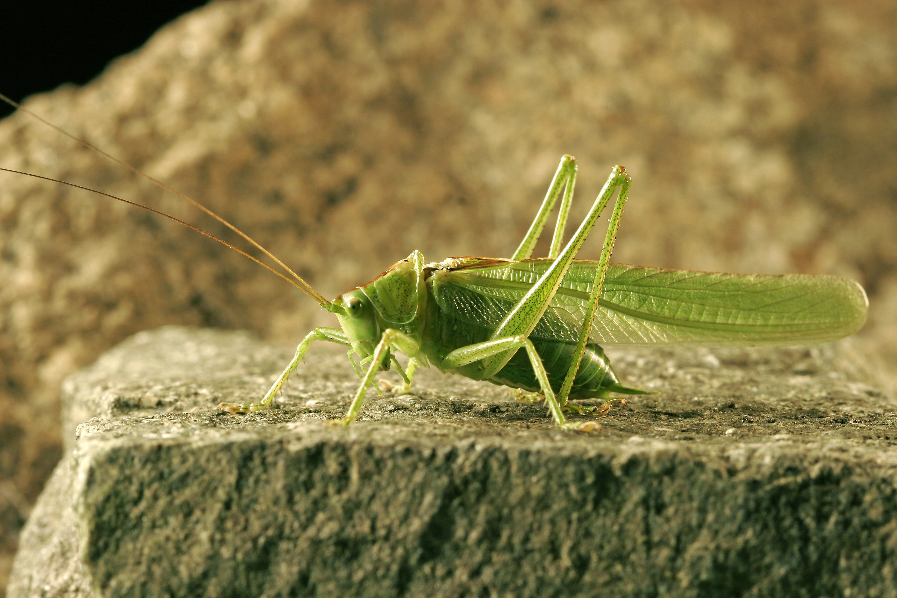 Tettigonia veridissima